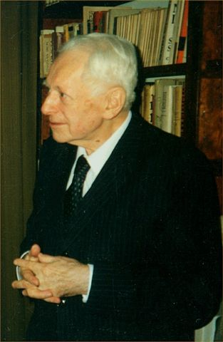 Artur Międzyrzecki (1922-1996), Polish writer and translator.